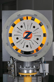 Grote branders 2.0